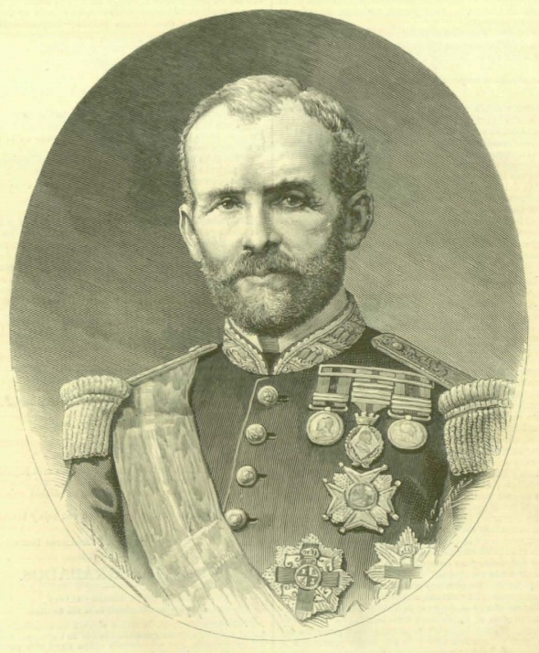 Excmo Sr. D. Emilio Calleja, nombrado Capitán General de la Isla de Cuba.